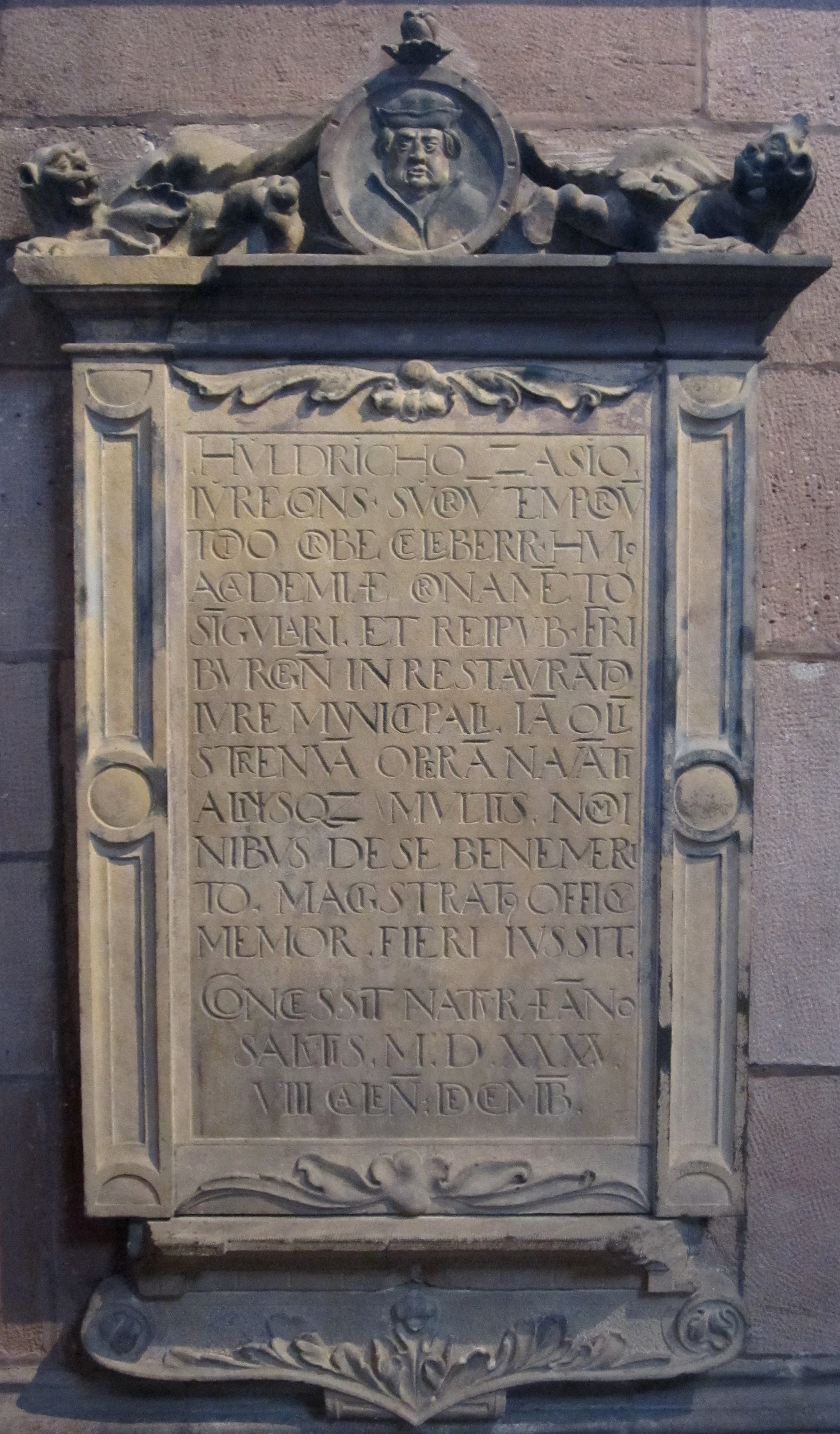 Ulrich Zasius (* 1461 in Konstanz; † 24. November 1535 in Freiburg im Breisgau) war ein deutscher Jurist und Humanist.